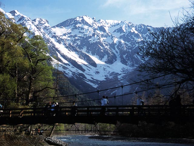 Rio Azusa y Puente Kappa en Kamikouchi. Foto por Usario Inti-sol en Mayo, 2002. 上高地の梓川と河童橋。投稿者が2002年5月に撮影